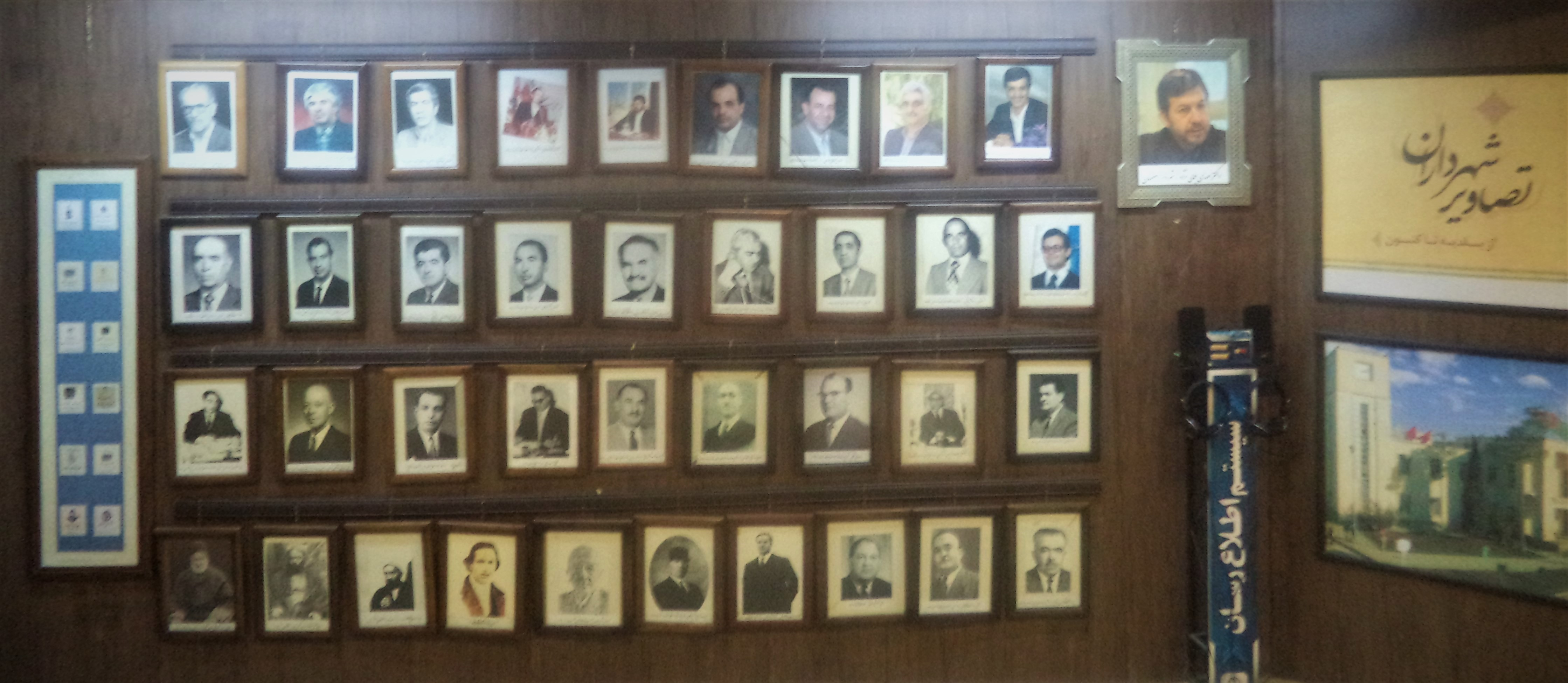 شهرداران اصفهان از 1286 تا 1395 نمایشگاه نصف جهان شهرداری اصفهان- 1395